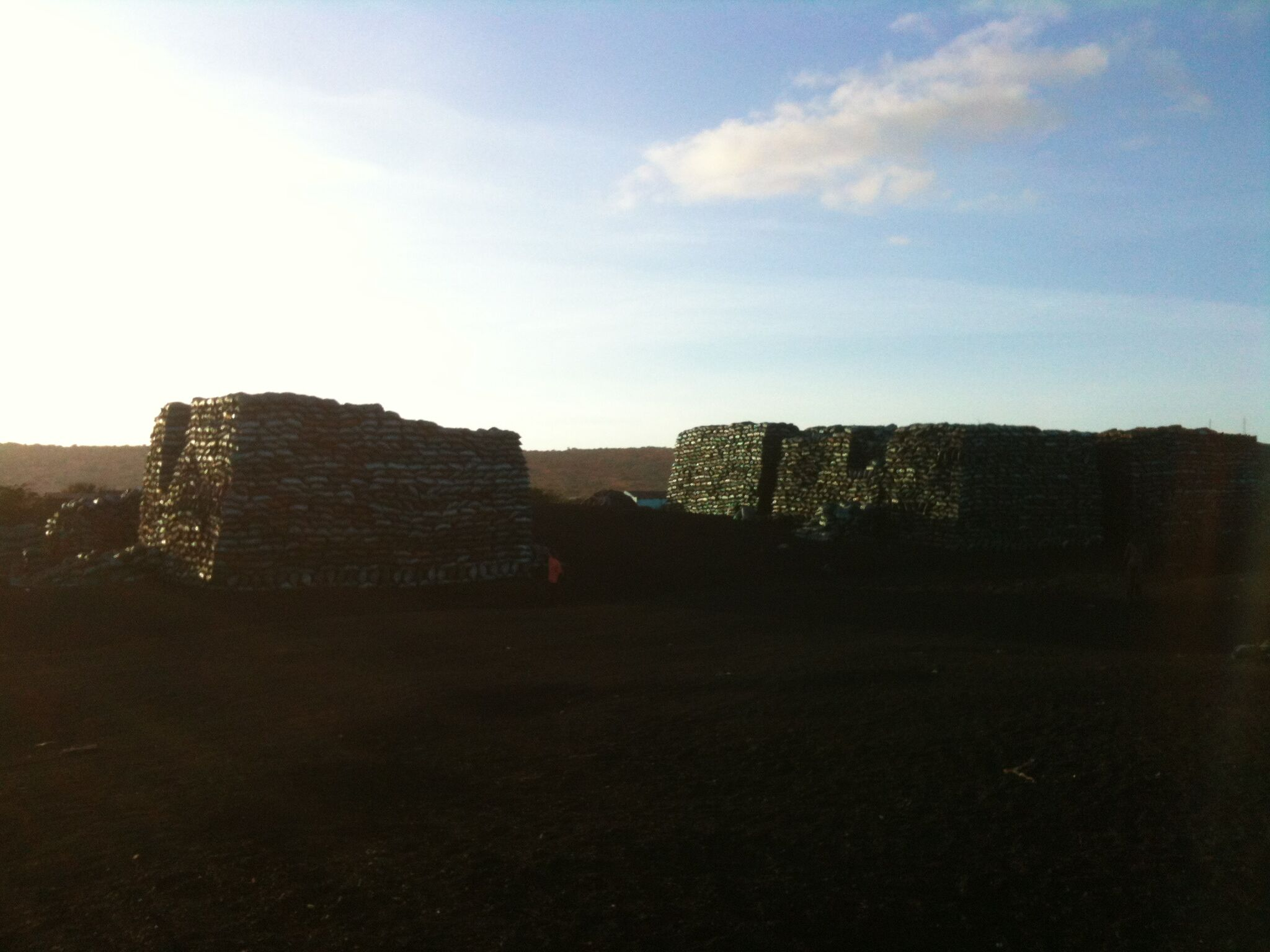 Soomaaliga: baraawe